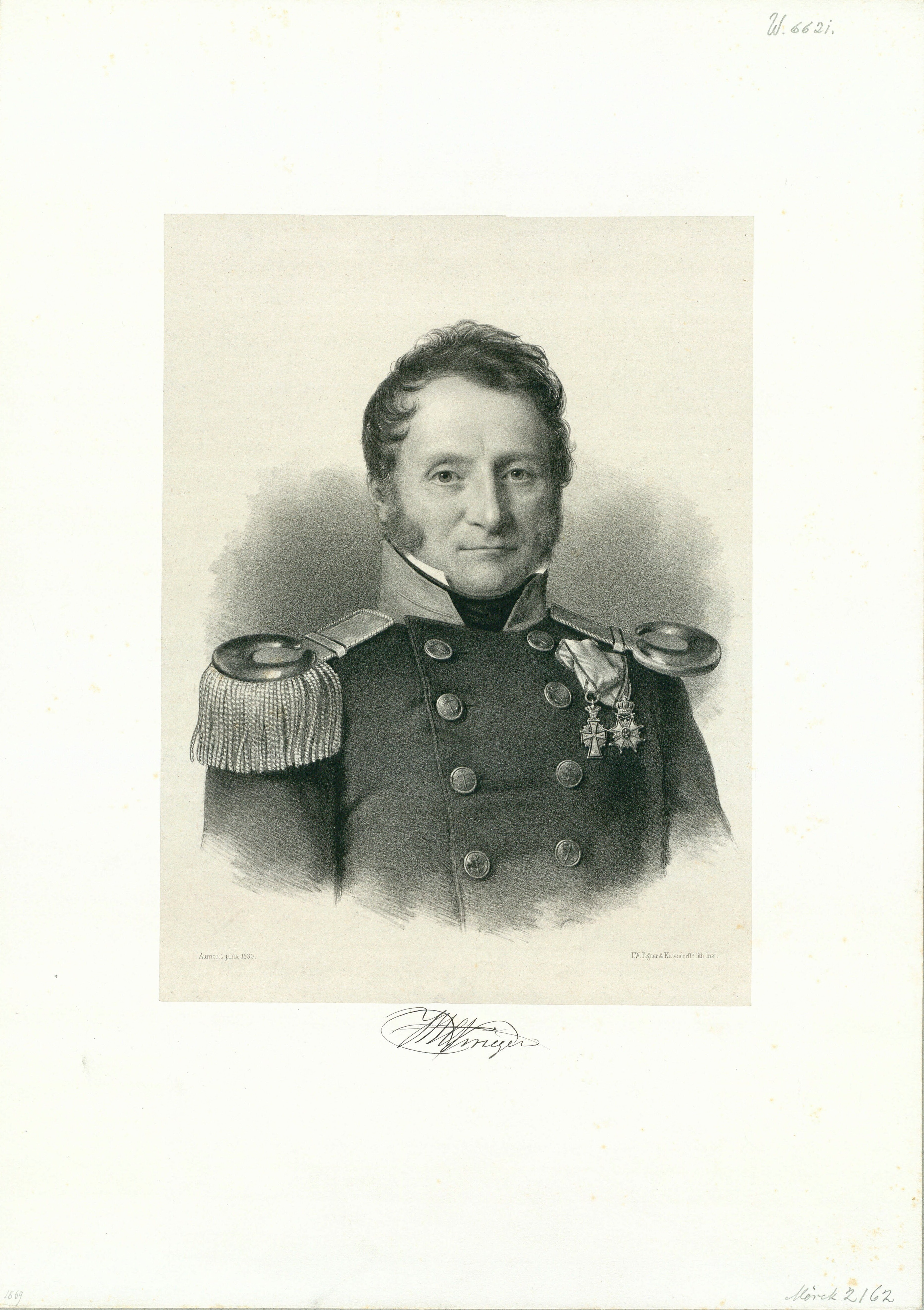 Johan Wilhelm Cornelius Krieger (1788-1857), Danish admiral